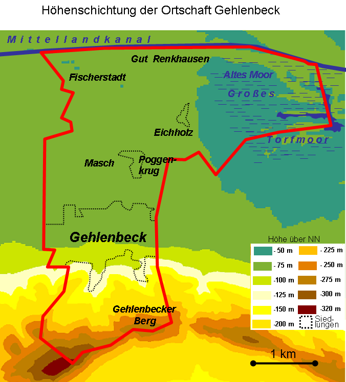 Topographie der Ortschaft Gehlenebeck